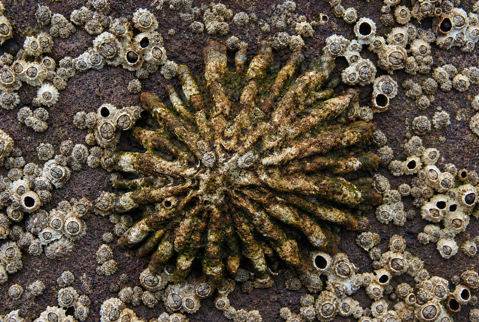 Ejemplar adulto de Patella ferruginea, en el litoral de Melilla.